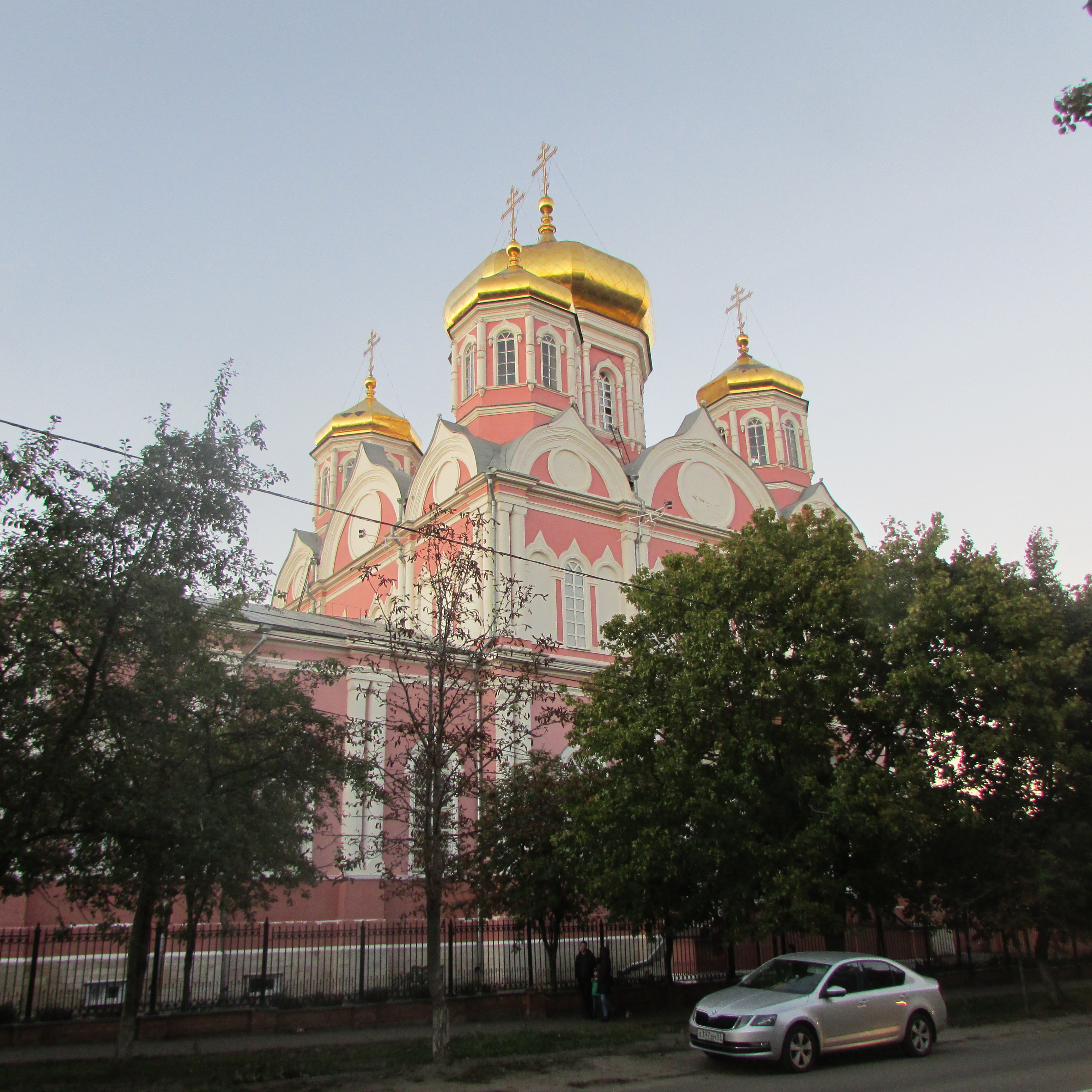 Церковь Смоленской Божьей матери: улица Нормандия-Неман, 27-а, Орёл, Орловская область